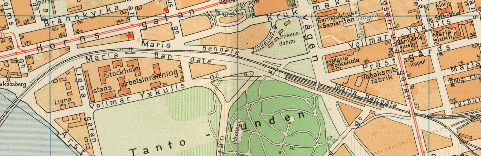 Maria Bangata på en karta från1926